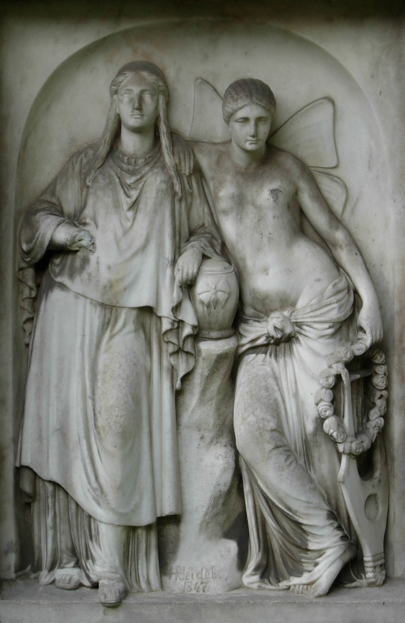 Hermann Rudolf Heidel: Psyche und Persephone (vgl. Persephone), Grabrelief (1847) für den Schriftsteller Philipp Joseph Rehfues auf dem Alten Friedhof Bonn; die beschädigte linke Figur (Persephone) hielt vermutlich einen Granatapfel in ihrer rechten Hand